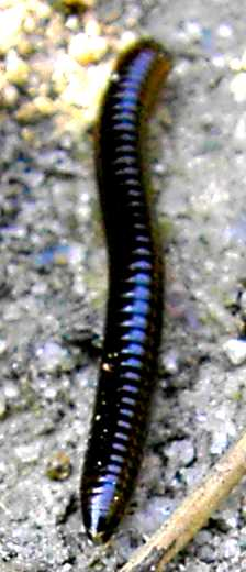 Diplopoda